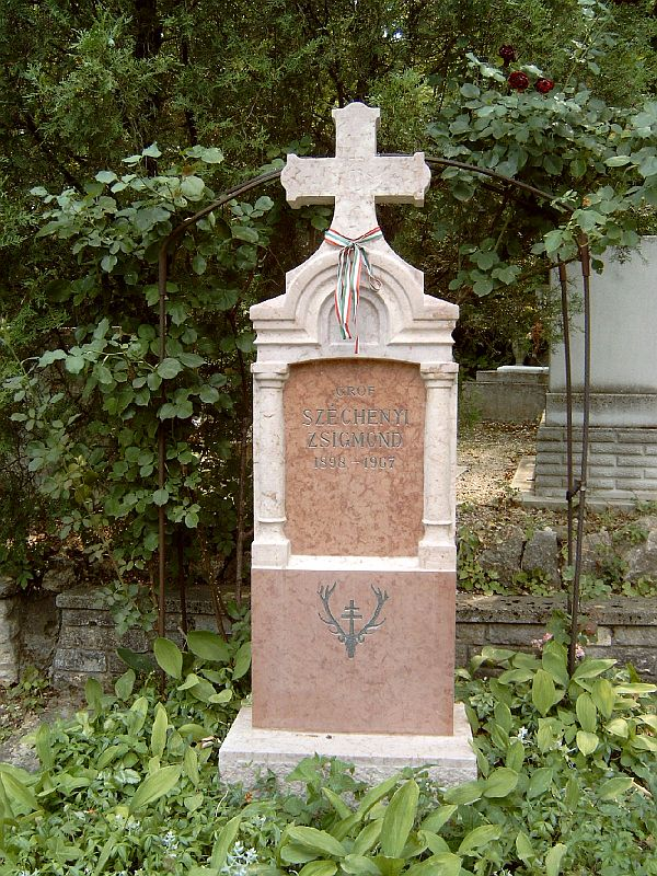 Széchenyi Zsigmond (Nagyvárad, 1898. jan. 23. – Bp., 1967. ápr. 24.): világjáró utazó, vadász, író sírja Budapesten. Farkasréti temető: 21/1-1-69/70.